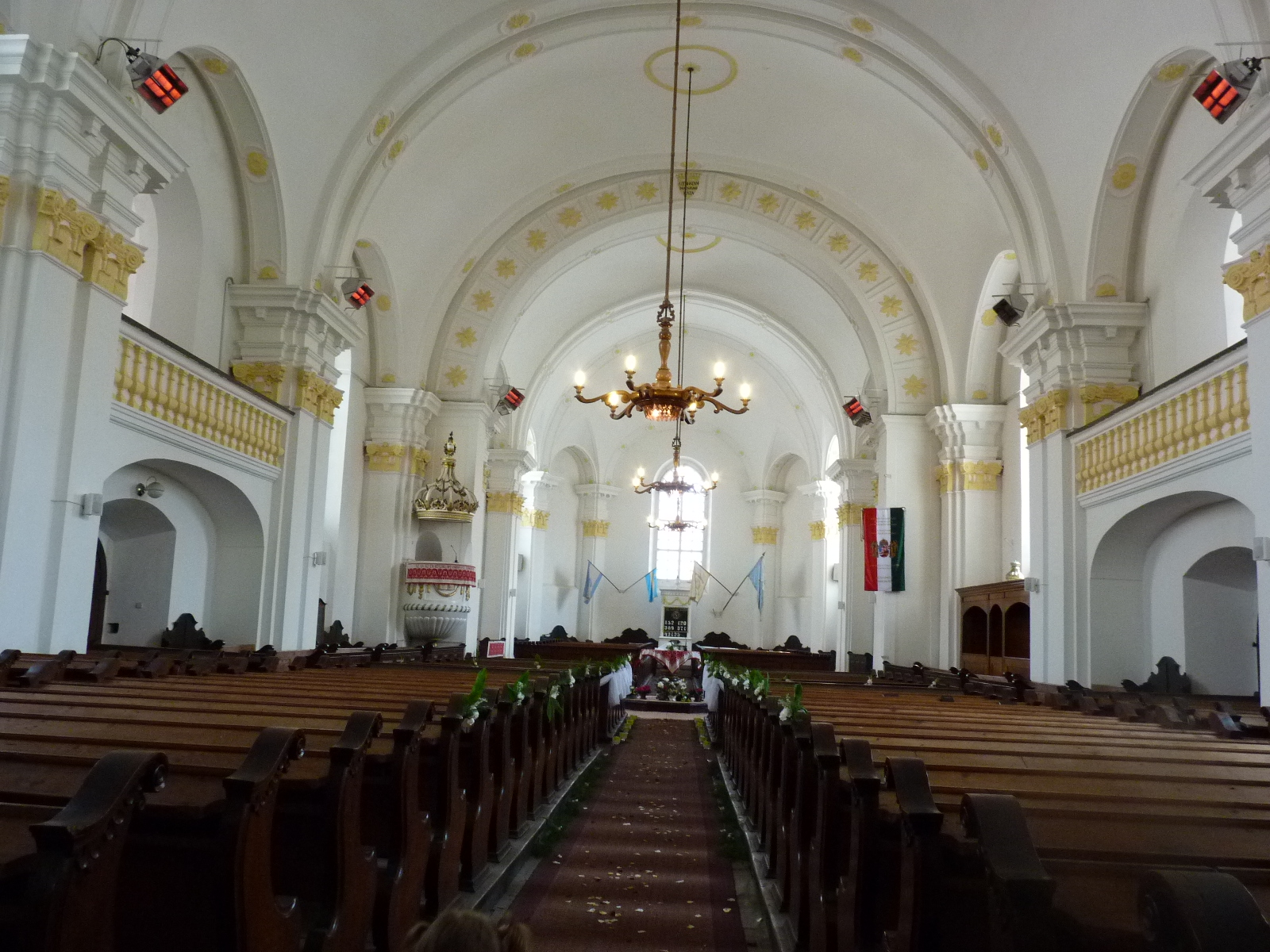 Interiorul Bisericii Reformate din Targu Secuiesc, Judetul Covasna. Primavara 2011